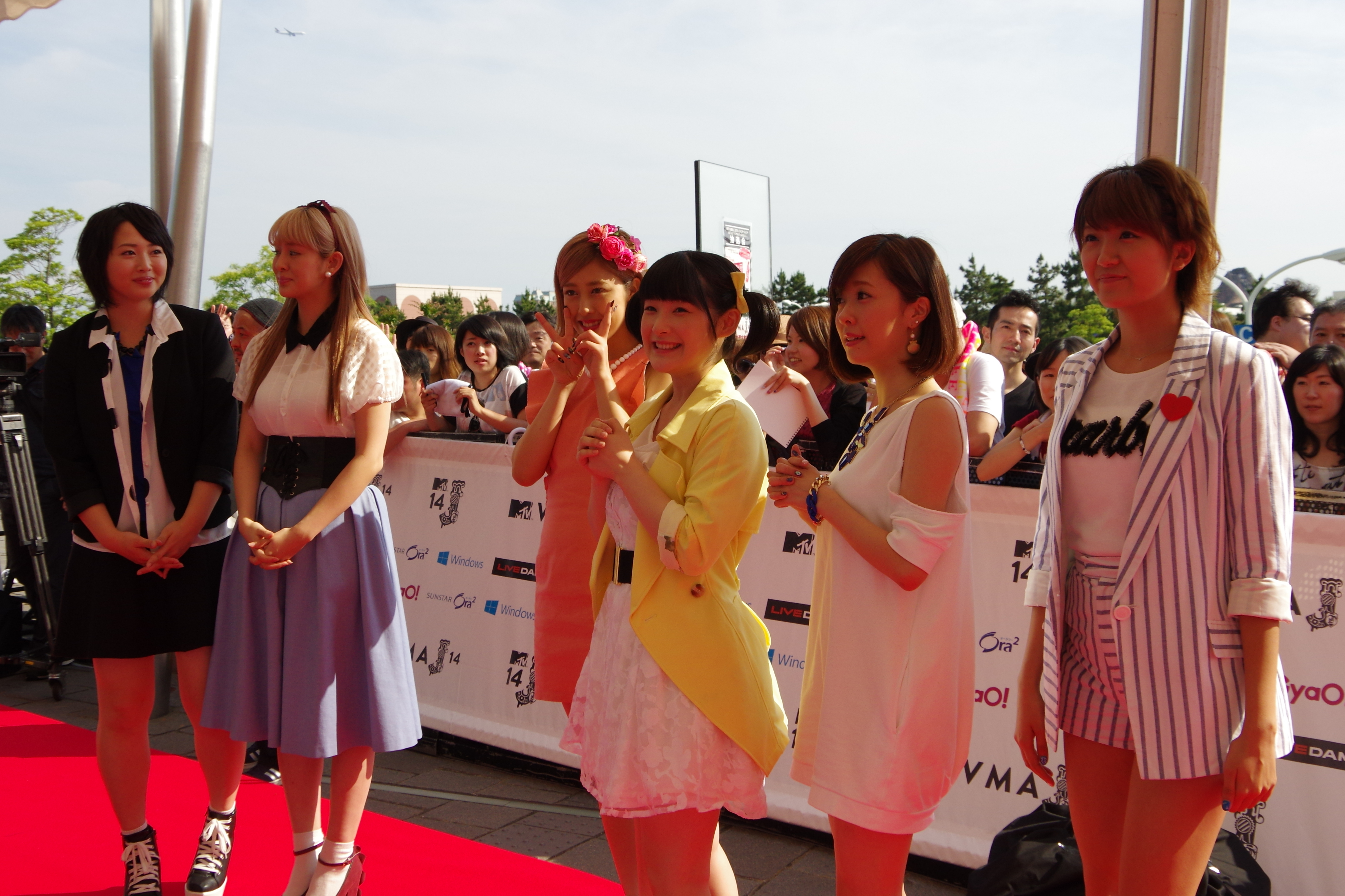 MTV VMAJ 2014_024_Berryz工房